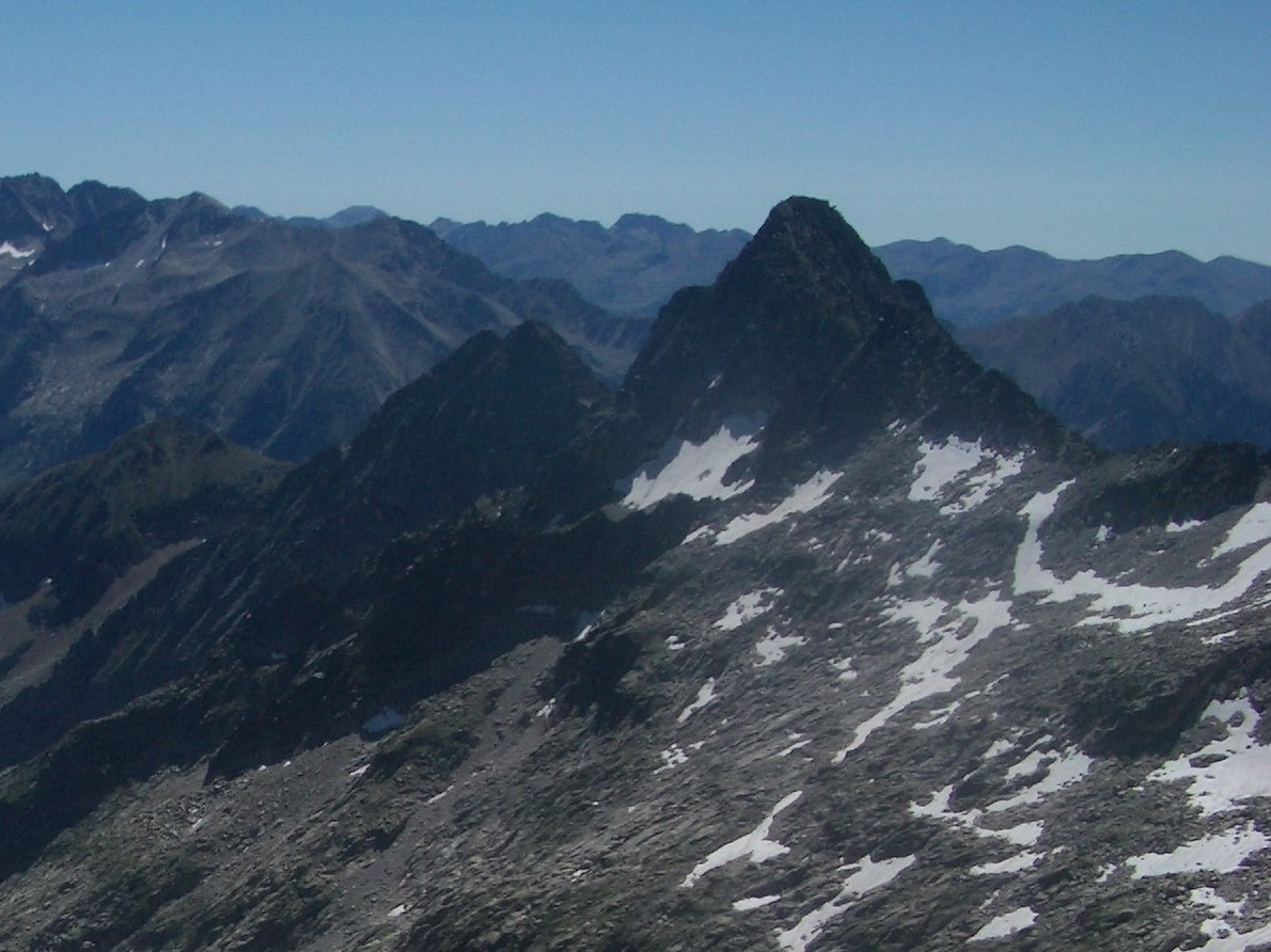 Vista del Pico de la Tallada